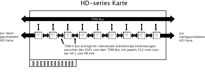 TDM II Busstruktur